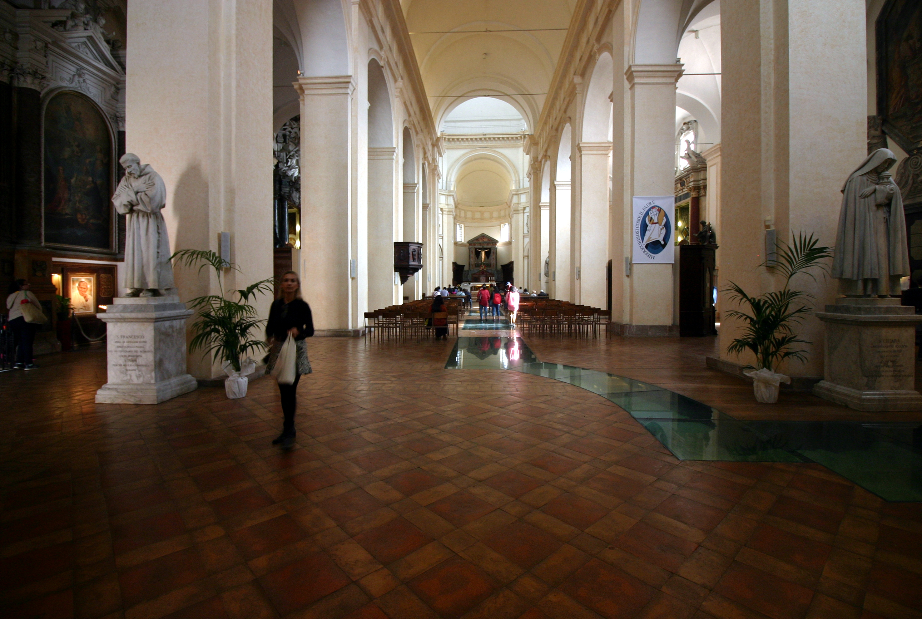 San Rufino - Assisi